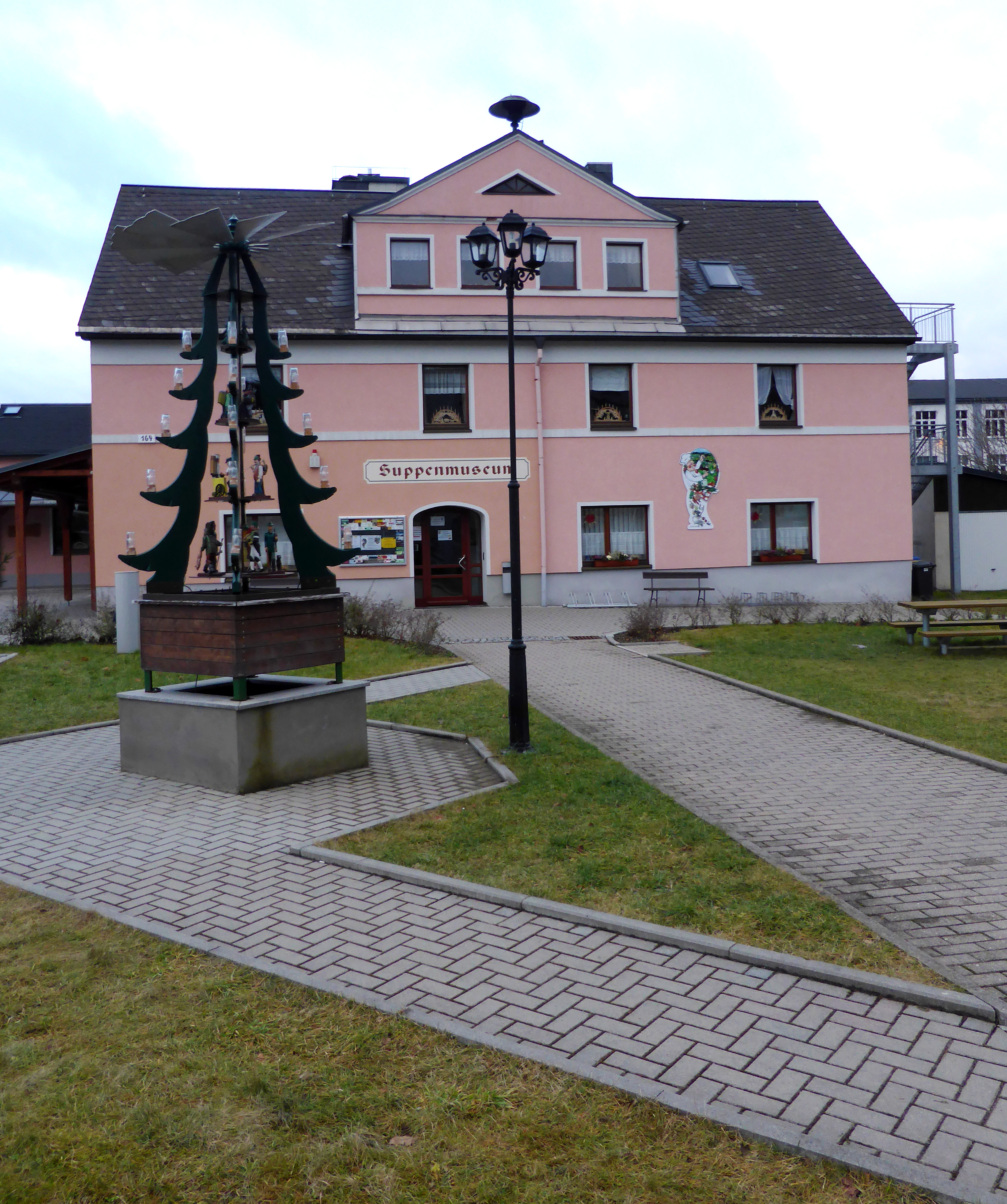 Suppenmuseum und Ortspyramide in Neudorf (Sehmatal), Erzgebirgskreis - Sachsen.